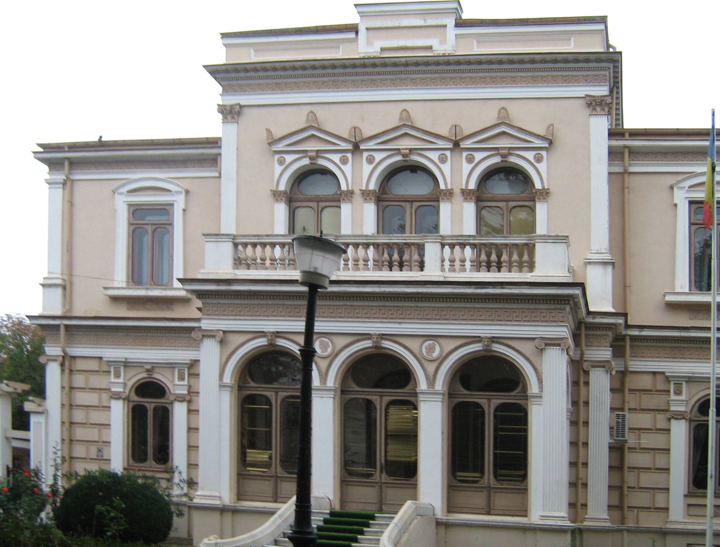 Casa Lambrinidi